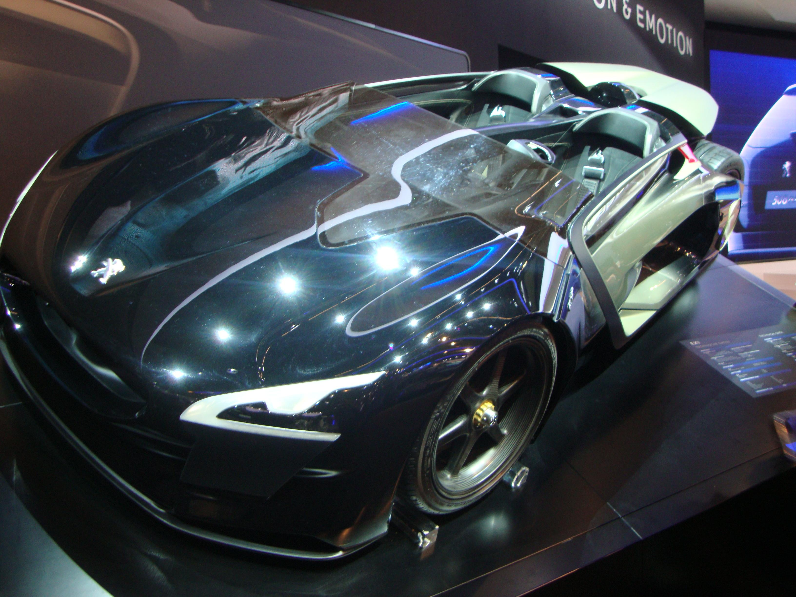 IAA Frankfurt